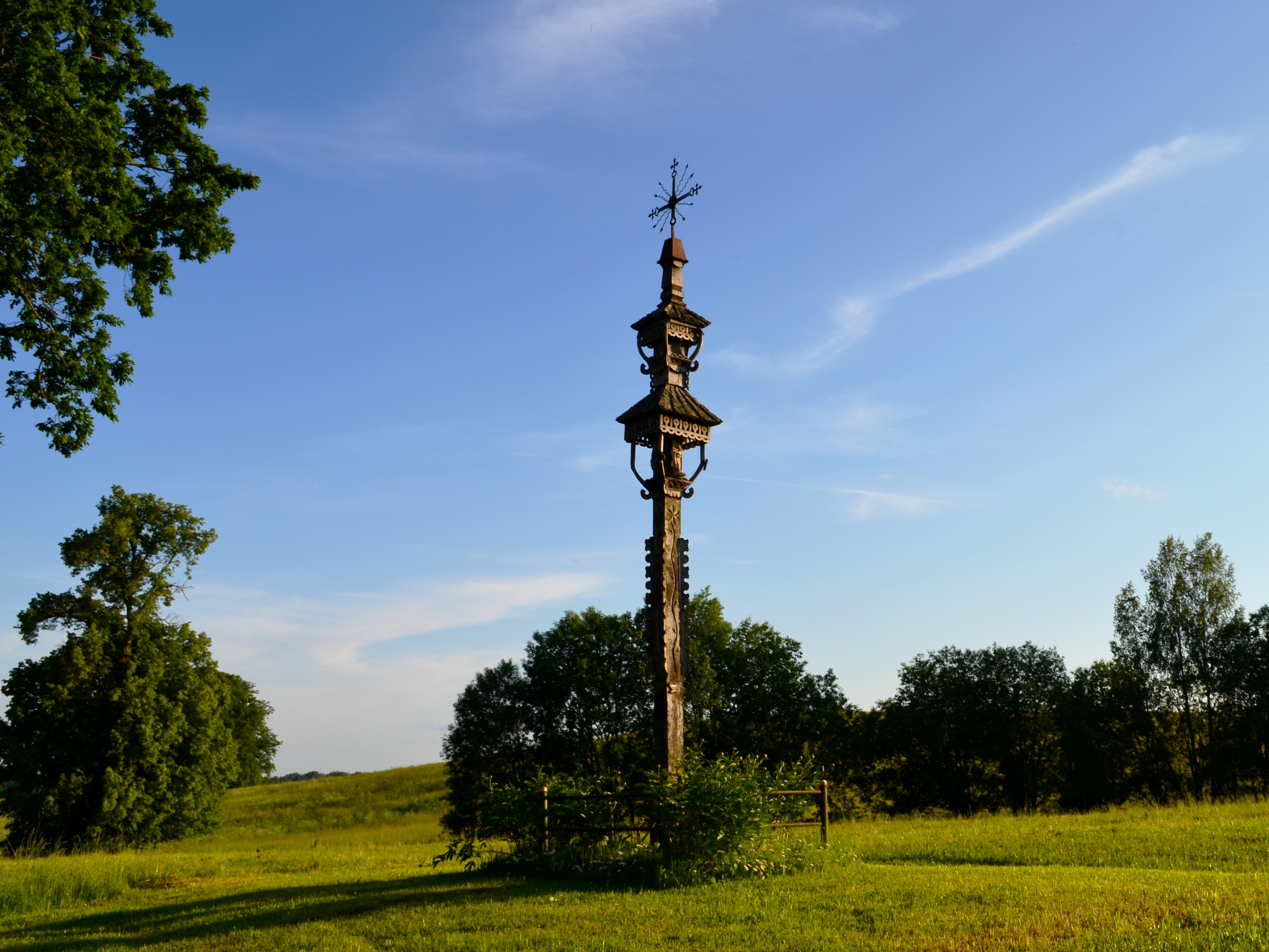 Stogastulpis Tolimėnuose, Salako sen., Zarasų r.